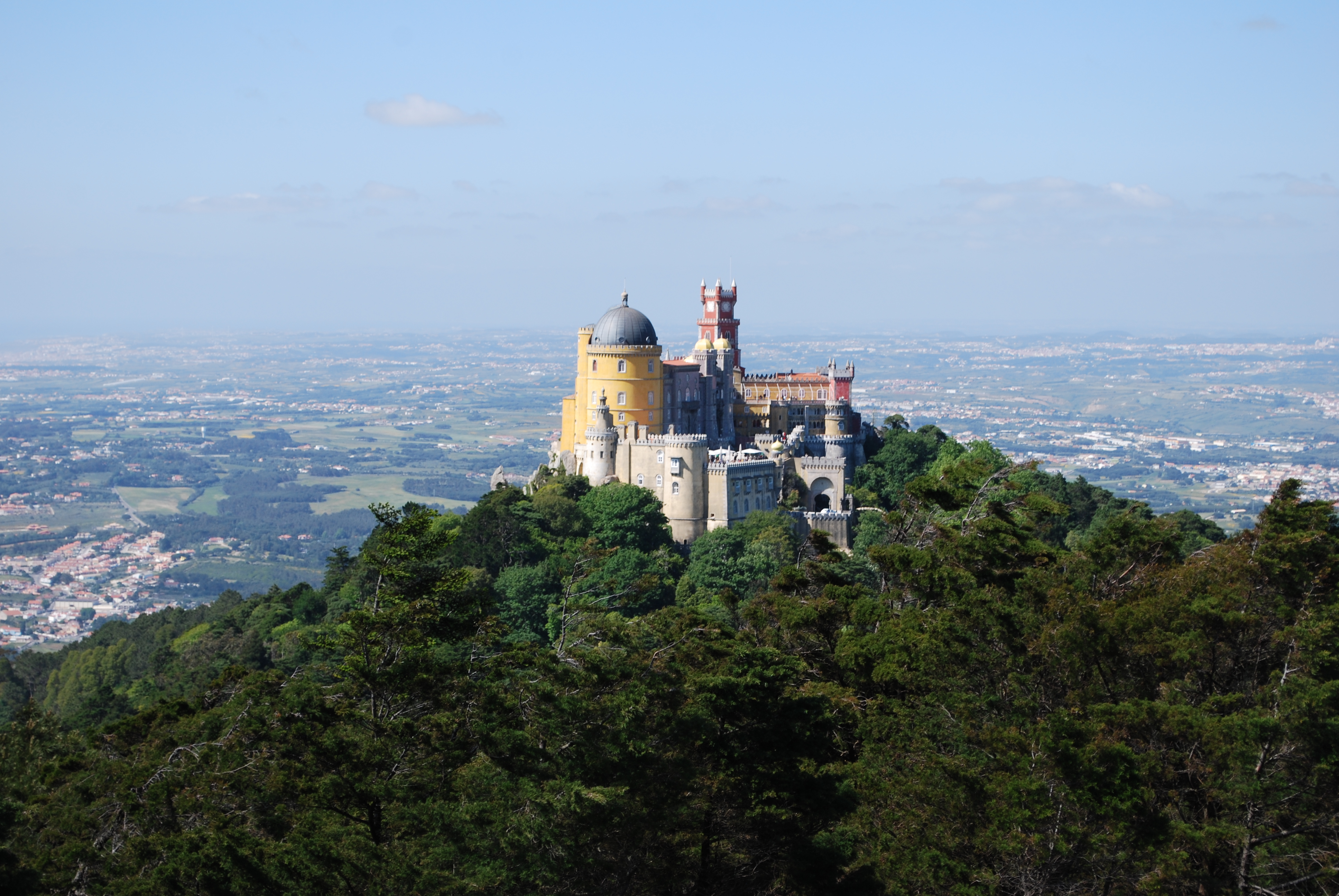 Palácio Nacional da Pena